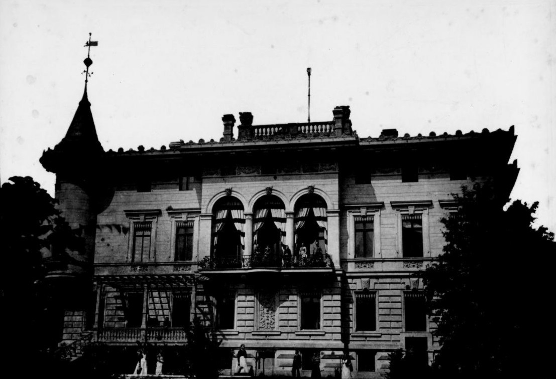 Willa Hermanna Fränkla - fotografia obiektu, wykonana od strony ogrodu z widocznymi na zdjęciu mieszkańcami. Willa była kilkakrotnie przebudowywana i remontowana. Za każdym razem zmieniała się jej architektura zewnętrzna, ale wewnętrzna również. Pierwszej przebudowy dokonano na początku XX w., po 1920, 1960 i 1970 r. Przebudowy dotyczyły głównie części południowej i zachodniej oraz układu funkcjonalno-przestrzennego i wystroju wnętrz. Najprawdopodobniej w latach 20. XX w. dodano metalowe, angielskie okna w arkadach loggii. Największy remont przeprowadzono w budynku w latach 60. XX w., wymieniona wówczas została część stropów na żelbetowe, zmieniono także drewnianą więźbę dachową na żelbetową. Efekty przebudowy widoczne są na zdjęciach obiektu z różnych okresów. Zniknął taras, schody i pergola od strony ogrodu, a także wykusz w kształcie wieży obronnej w południowo zachodnim rogu budynku, widoczny na zdjęciach z początku XX w.